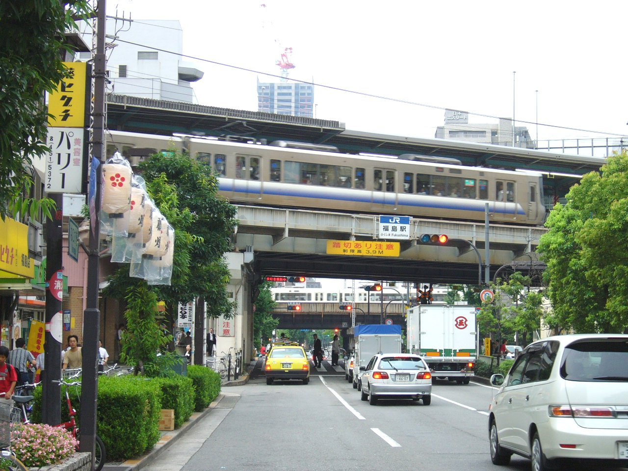 JR西日本福島駅（手前高架） 関空快速が通過中 高架下の踏切は梅田貨物線 奥で221系が通過している高架は東海道本線